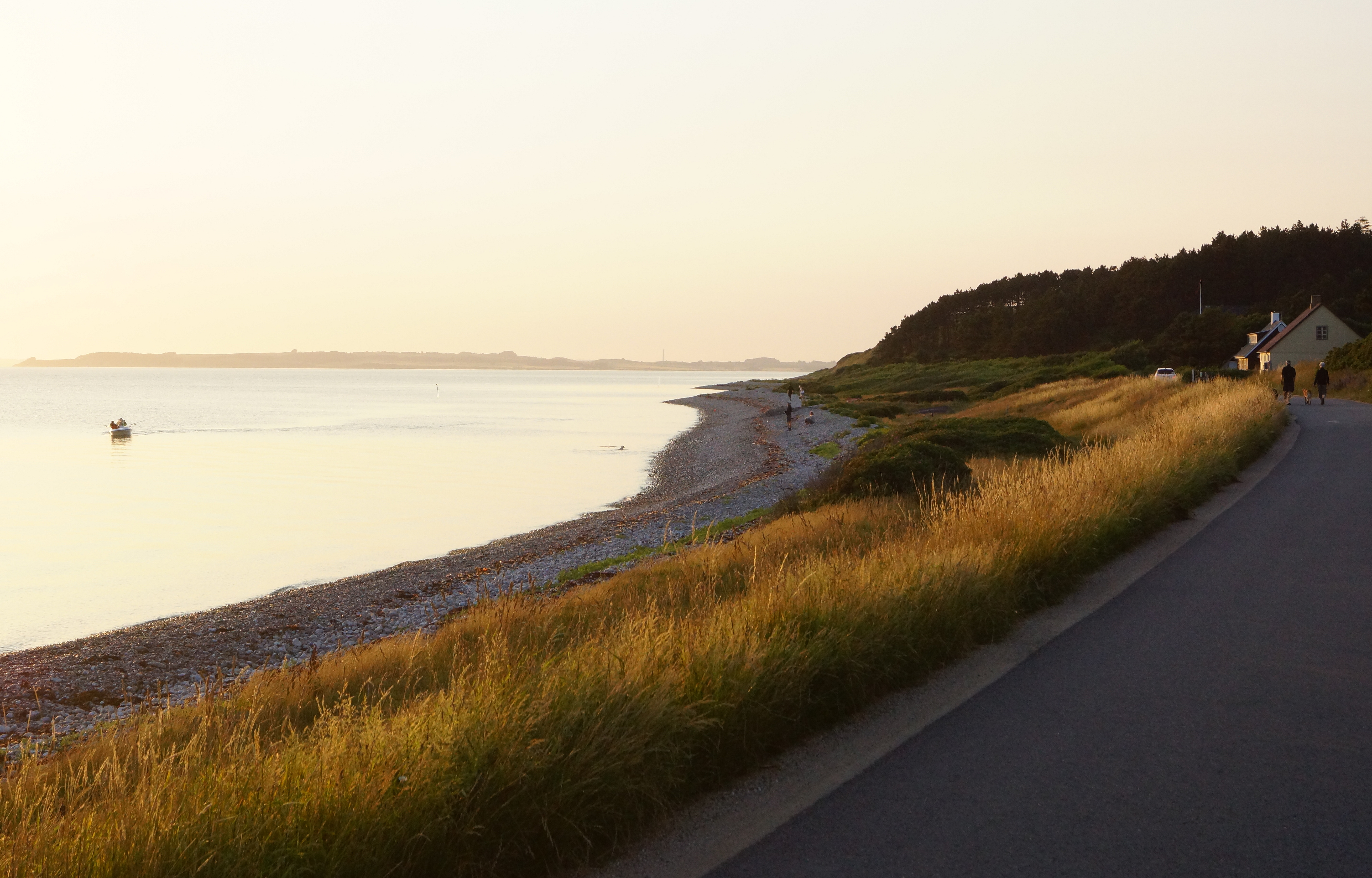 Helgenæs tæt på Sletterhage Fyr